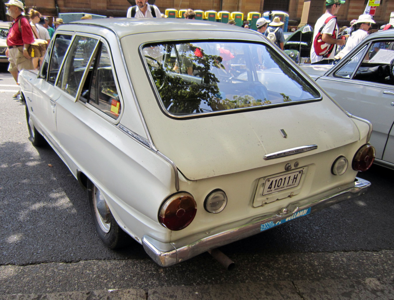 Mitsubishi Colt 1100F